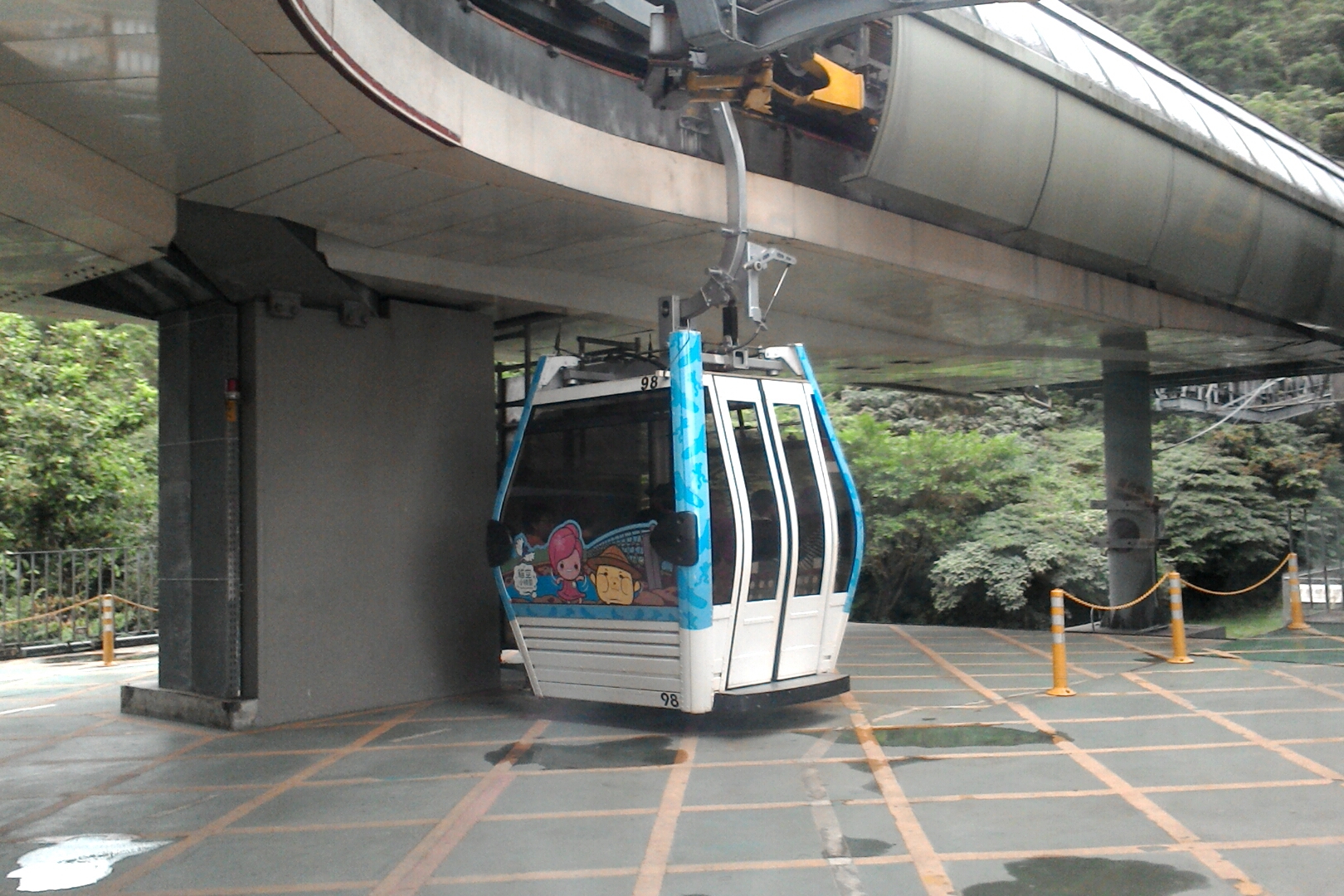 貓空纜車轉角二站內,台北市文山區二格山次分區政大里